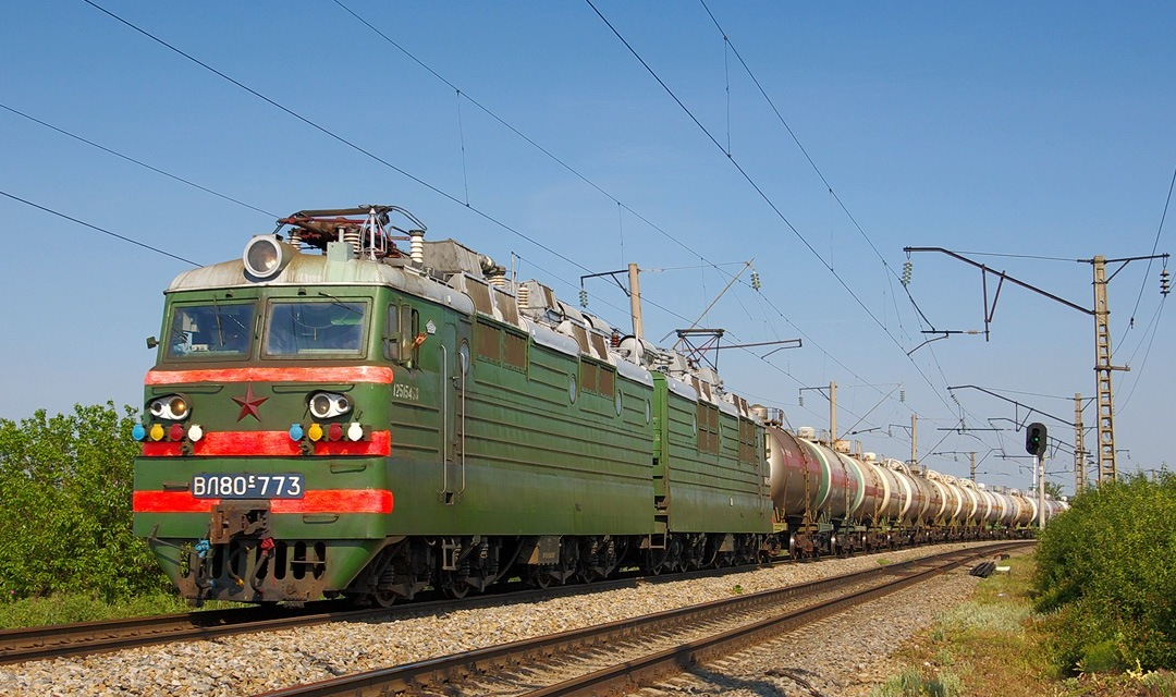 Электровоз ВЛ80С-773 с поездом